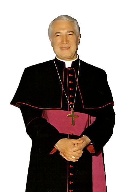 S.E. Mons. Francesco Cuccarese